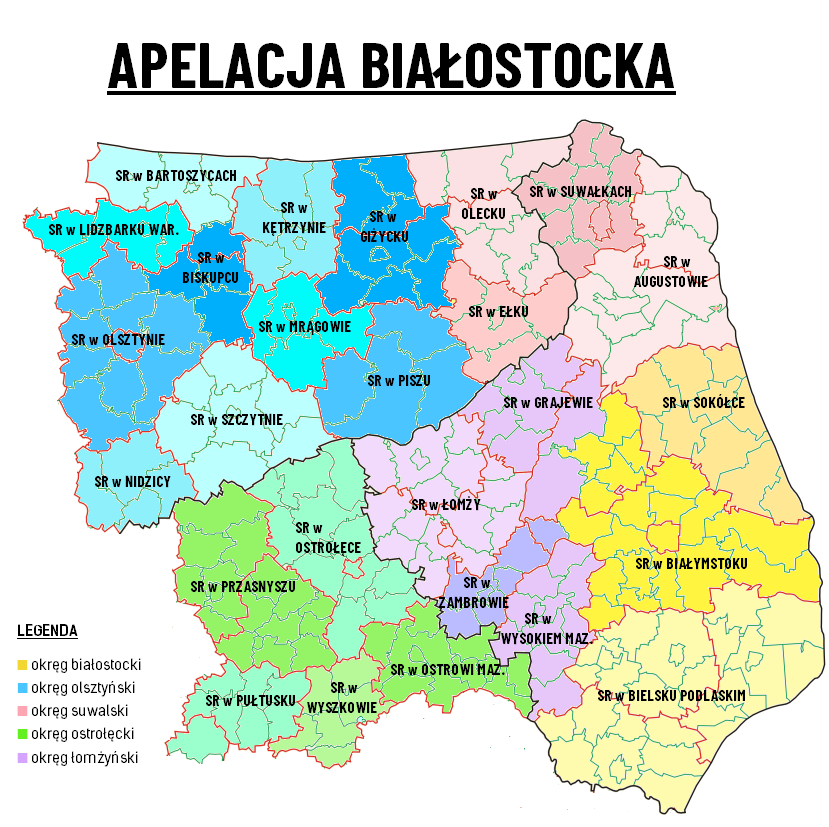 Obszar właściwości Sądu Apelacyjnego w Białymstoku z uwzględnieniem okręgów oraz rejonów.